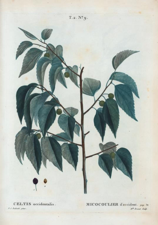 Celtis occidentalis = Micocoulier d'occident.